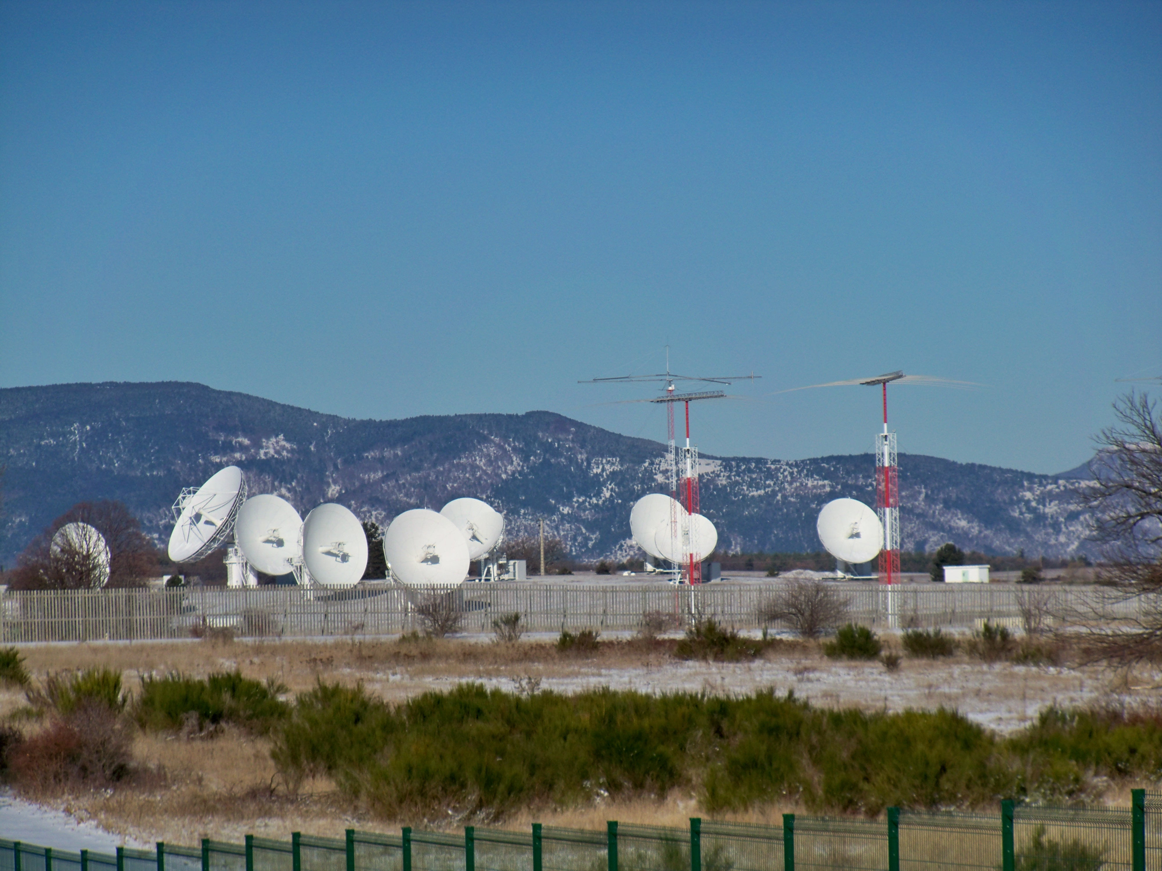 Station d'écoute dans la zone radar du Plateau d'Albion, Vaucluse, France